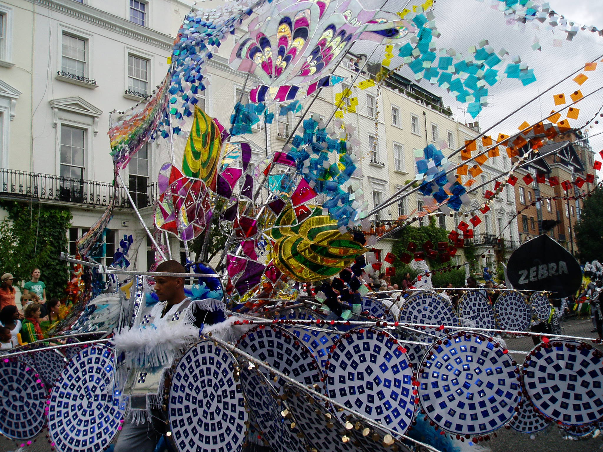 Ein Pfau-Kostüm beim Notting Hill Carnival (London, 2004)